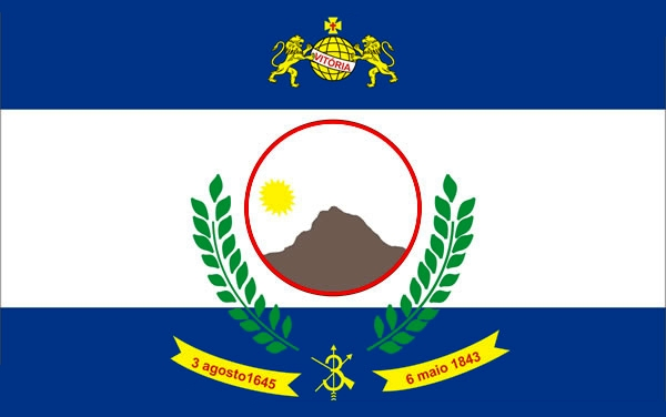 Bandeira idealizada por Romero Conolly, Lei – 1521 em 14 de julho de 1972. Aprovada pelo Prefeito José Augusto Ferrer de Morais e o Secretário de Educação Guido Galvão de Vasconcelos.